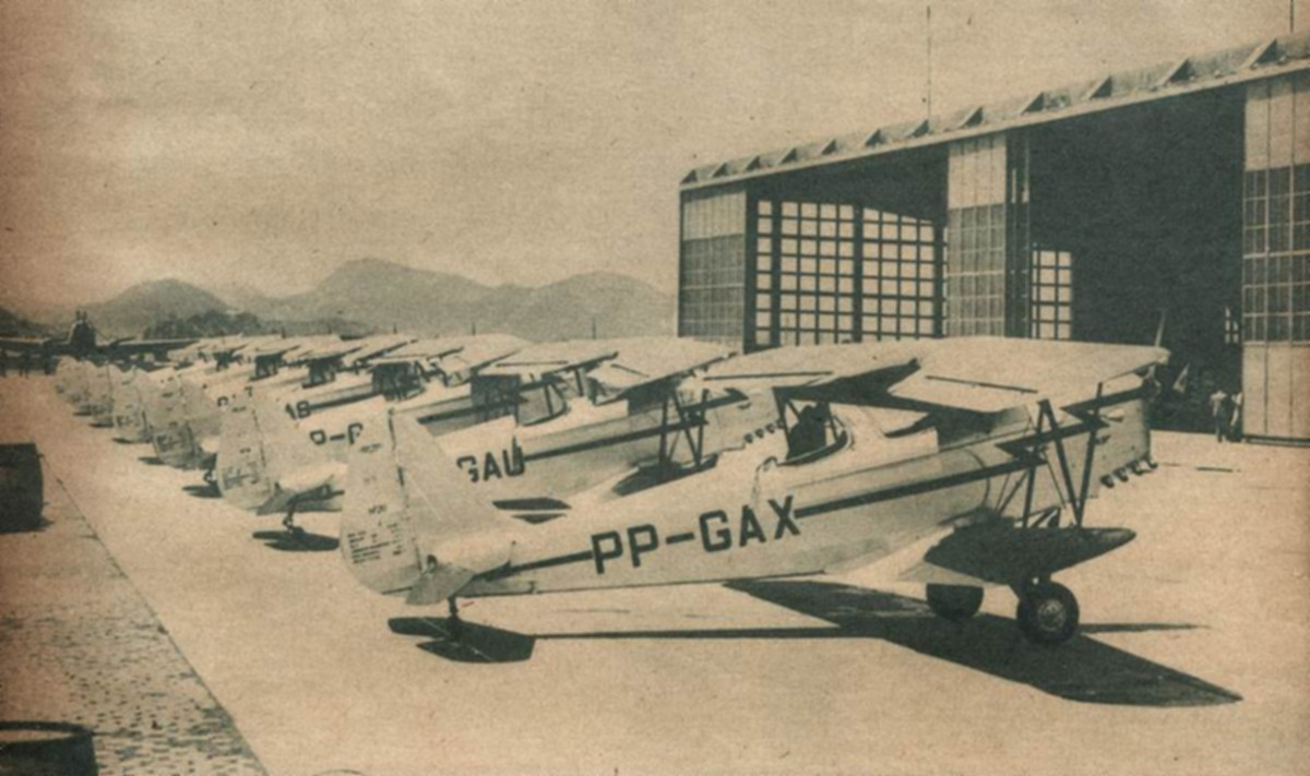 Aviões produzidos pela Fábrica Brasileira de Aviões" situada na Ilha do Viana, município de Niterói, estado do Rio de Janeiro, Brasil, em 1941.